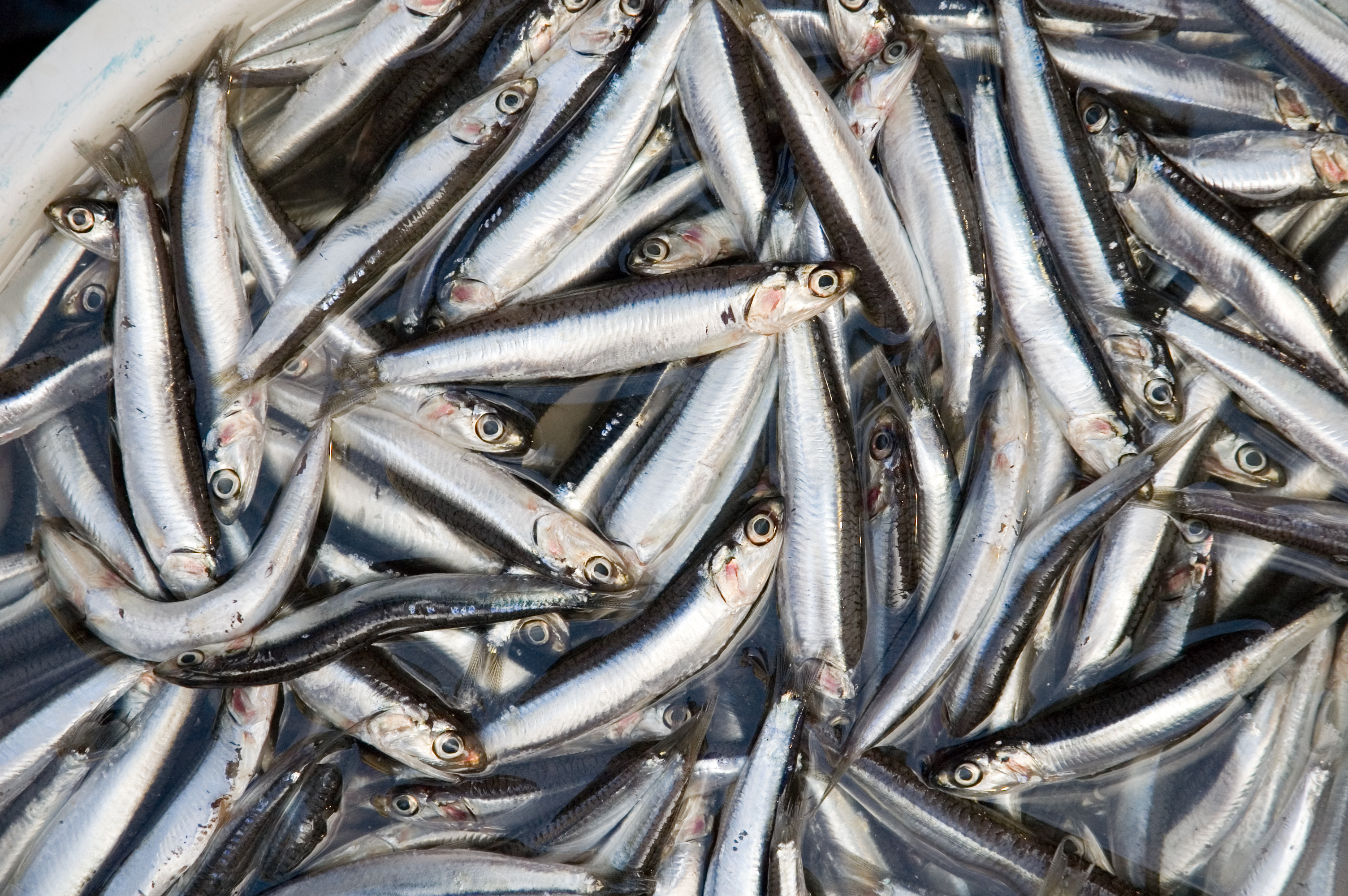 at Mercato Pignasecca